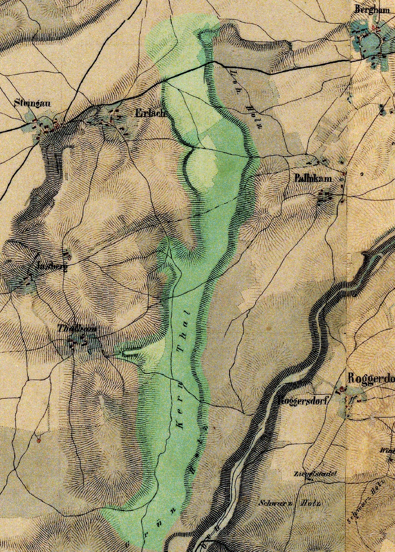 Verlauf des Kerntals auf Basis einer historischen Karte von 1875-1877, Bearbeitung eigene Arbeit